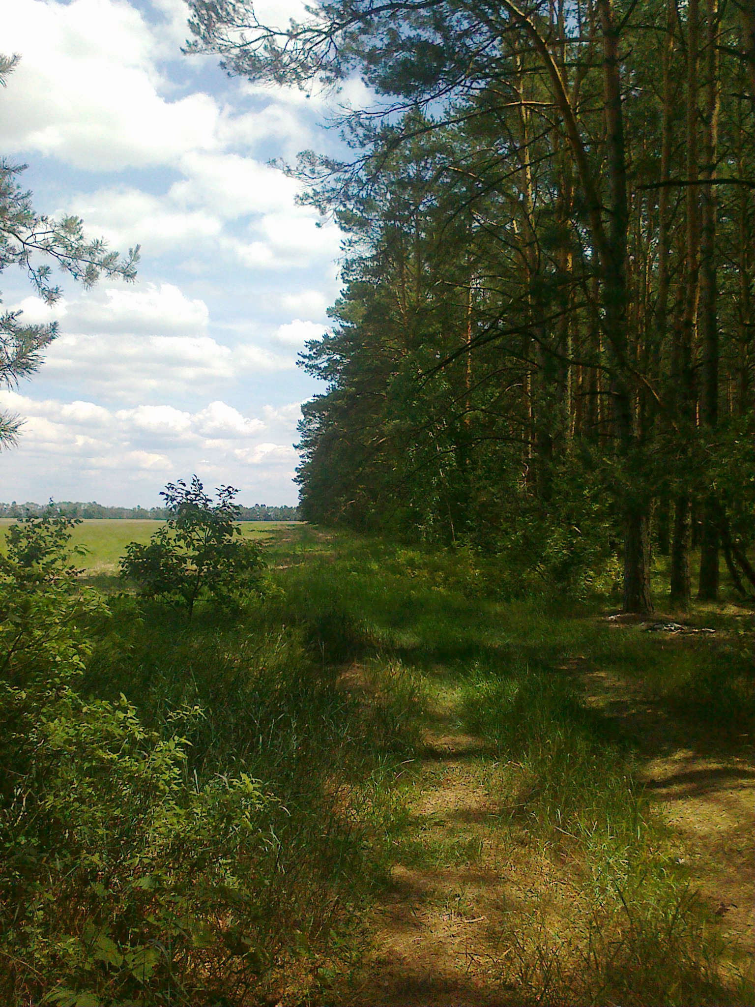 лес у деревни Старая Шараевщина